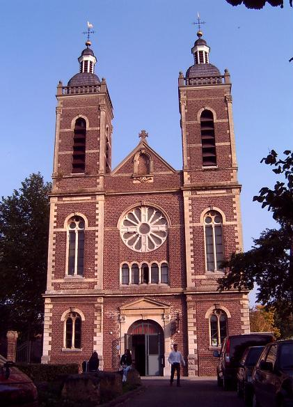 Limburgs: Bung: de aw kèrk